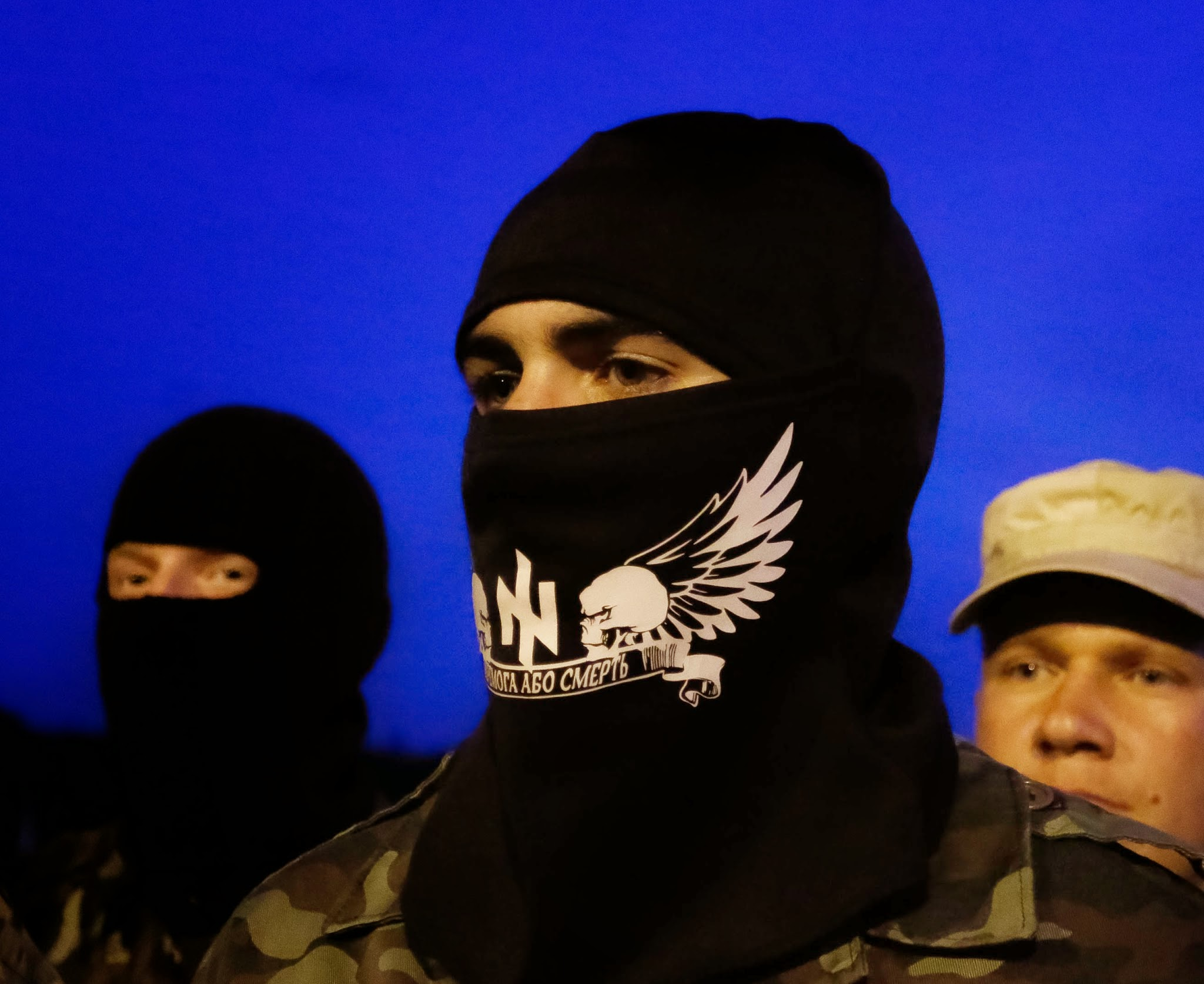 Батальйон Січ